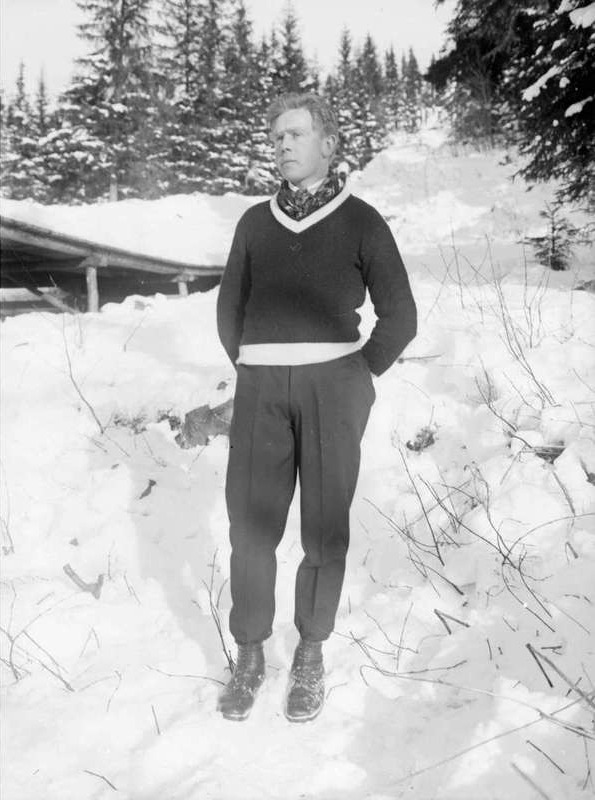 Norwegian skier Trygve Brodahl in Lillehammer